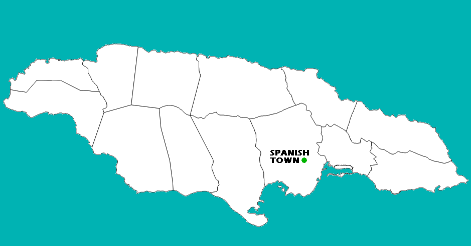 Localización de Spanish Town, Jamaica.